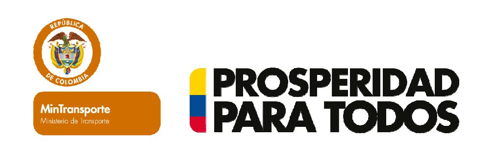 COLOMBIA